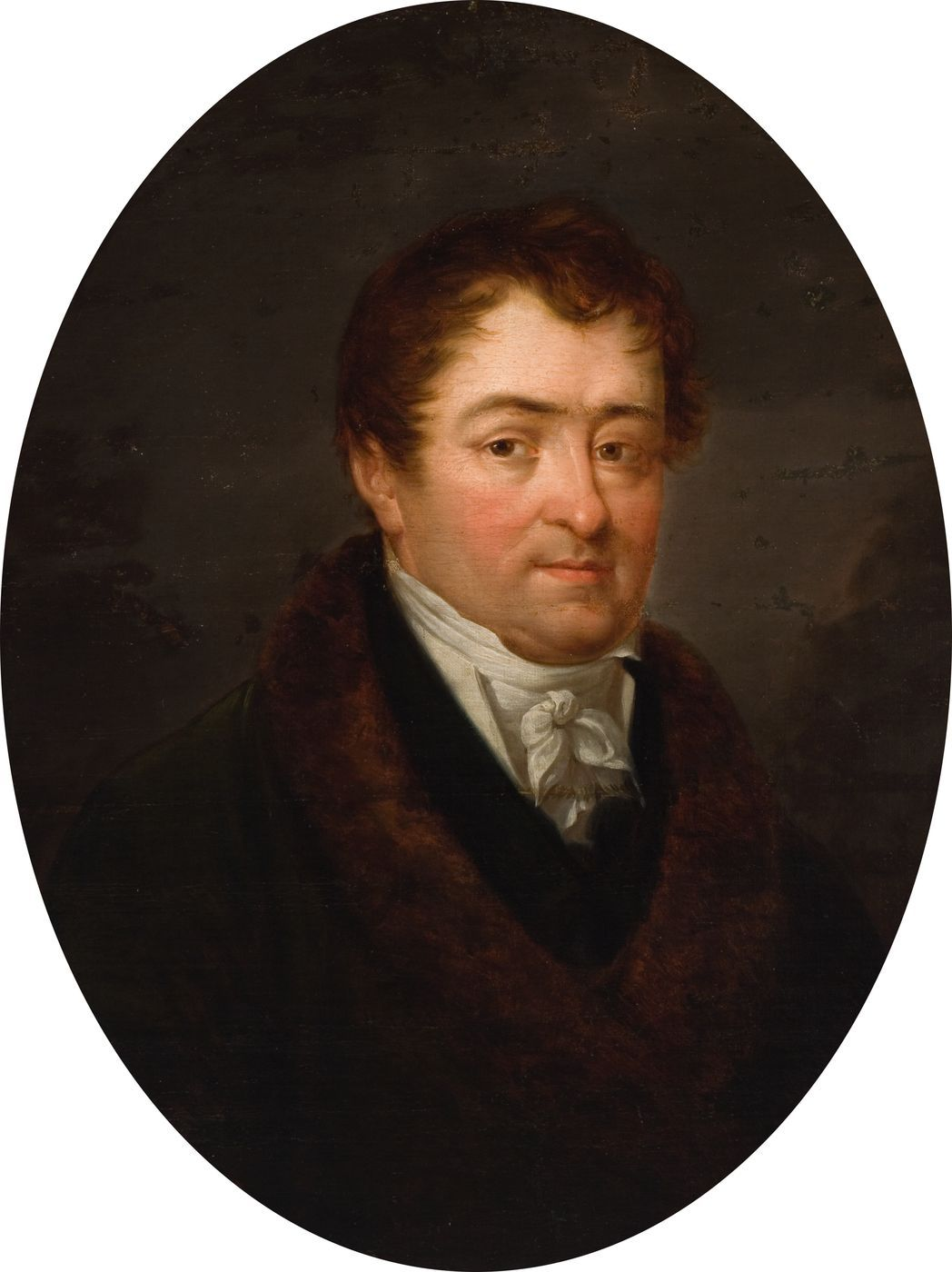 Беларуская (тарашкевіца): Партрэт Адама Бялькевіча (Adam Bialkievič)